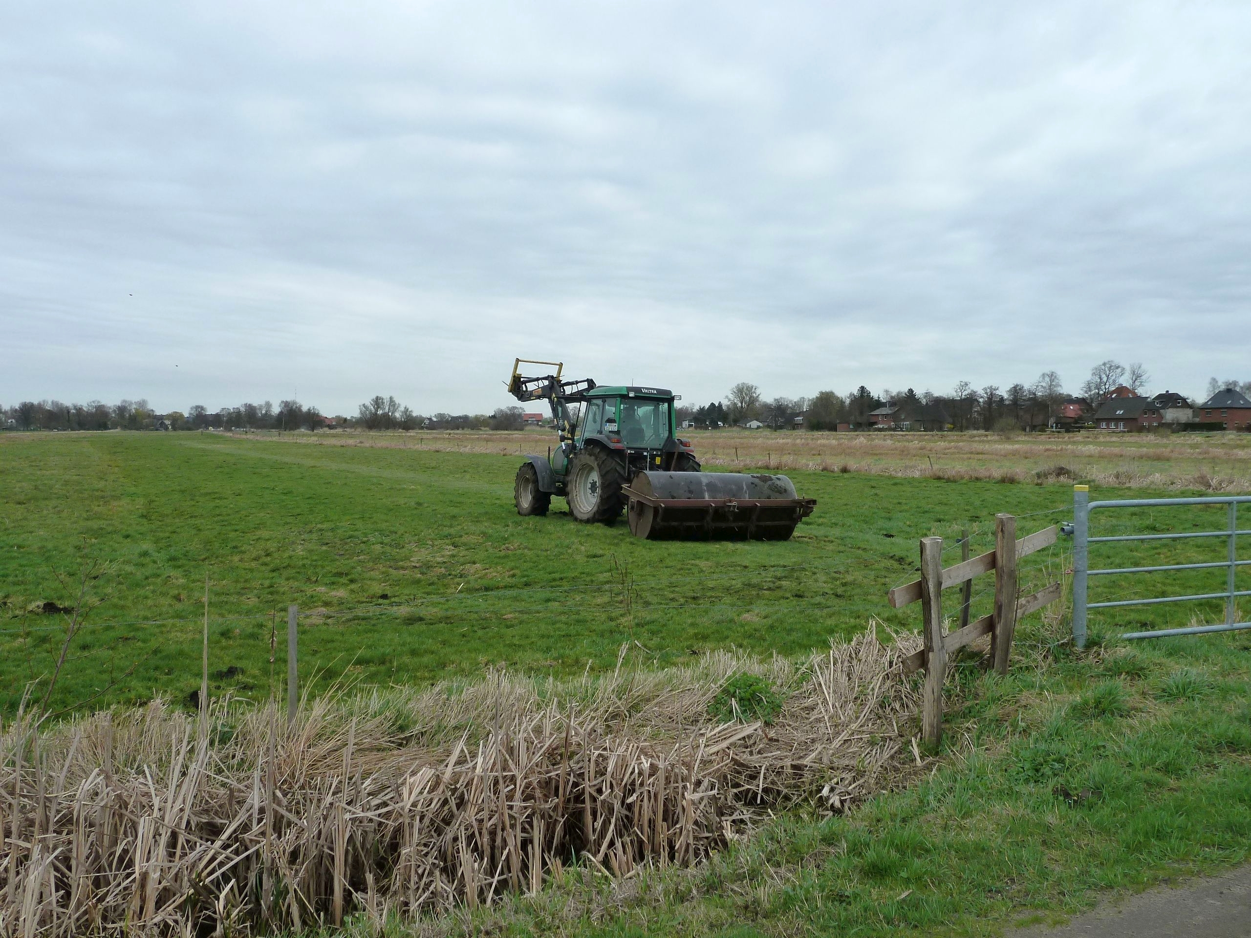 Walzen von Grünland (Moorstandort) während der Brutzeit im April